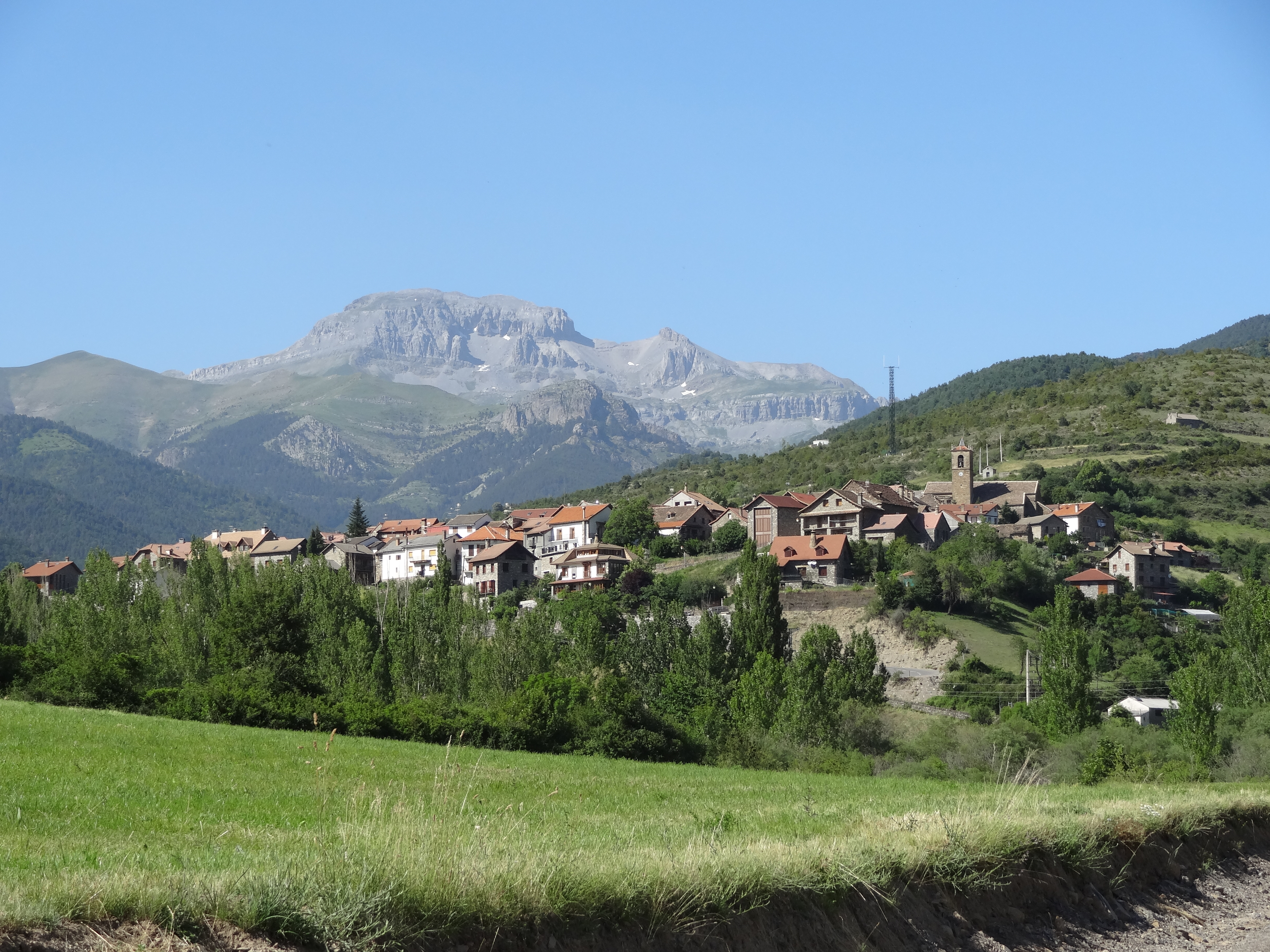 Jasa